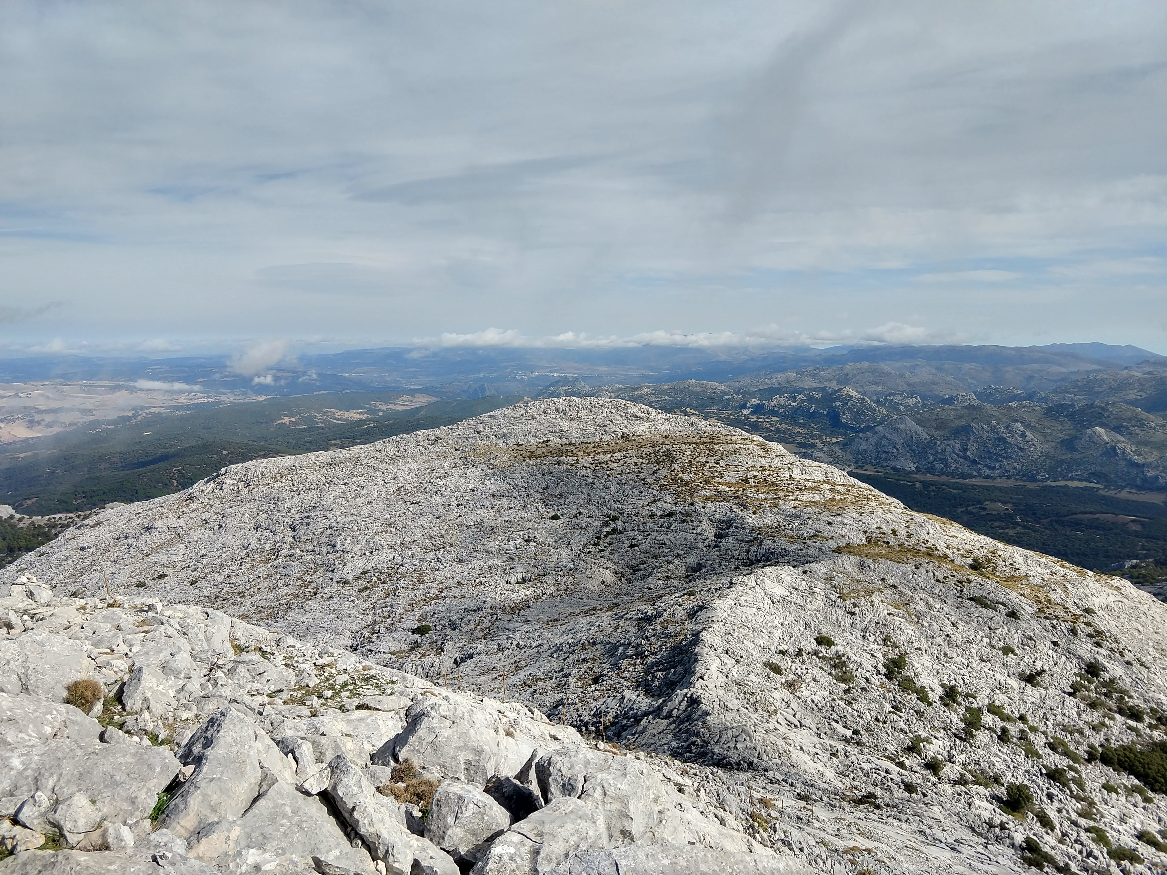 Cima del Pico Reloj visto desde el vecino Pico Simancón en Noviembre de 2019